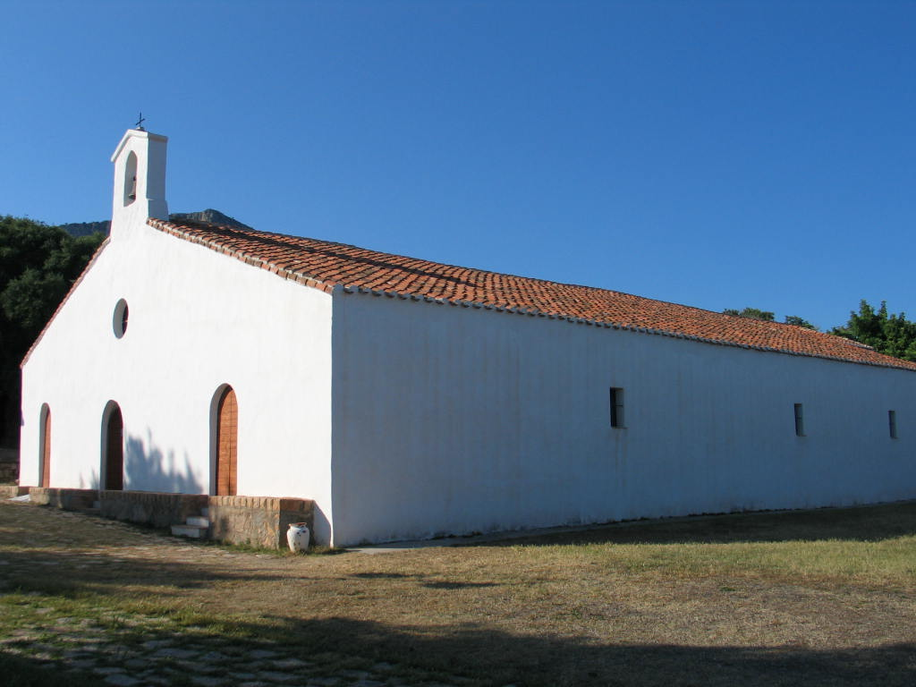 anta Maria Navarrensen dagoen Nafarroako Santa Maria eliza